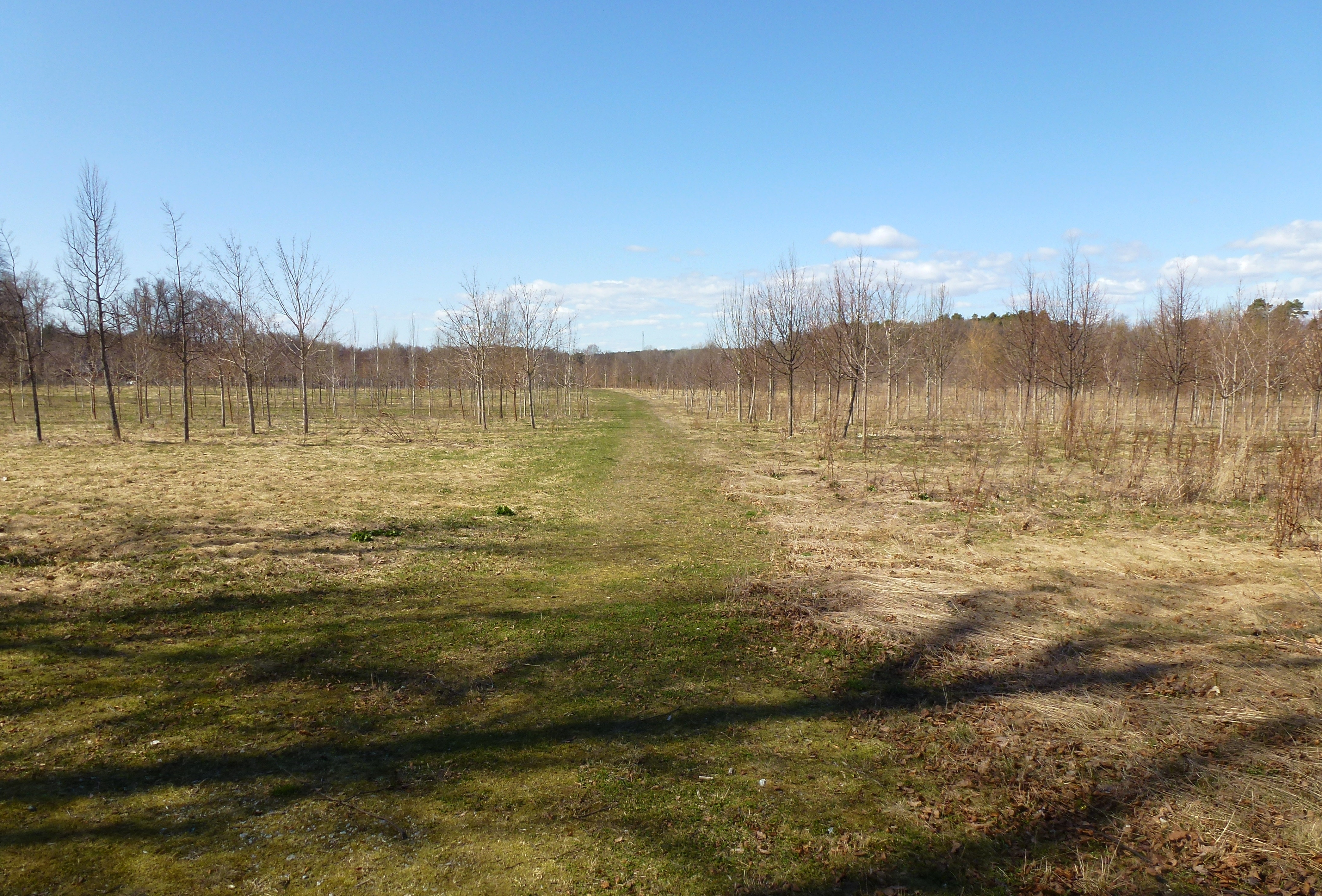 Riddersviks gård Stockholms stads trädskola